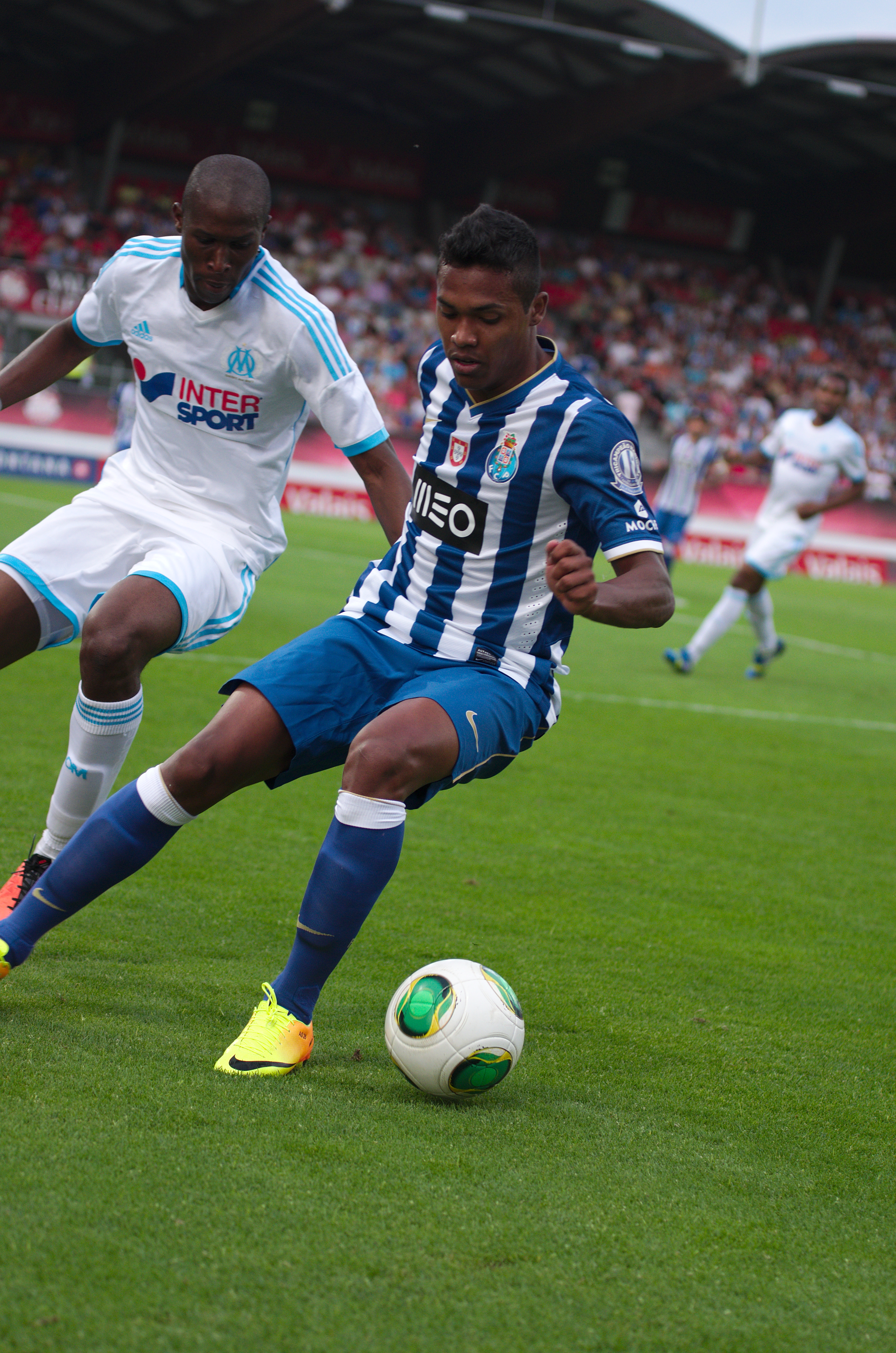 Valais Cup 2013 - OM-FC Porto - 20130713 - Rod Fanni et Alex Sandro